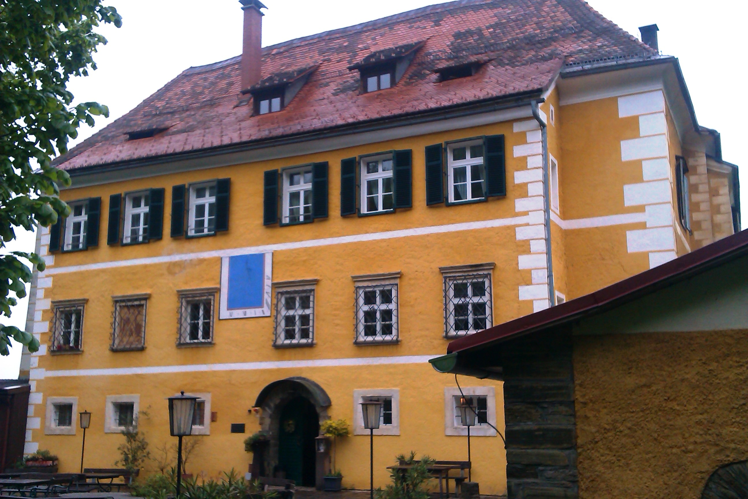 Schloss Limberg bei Wies, Baukörper